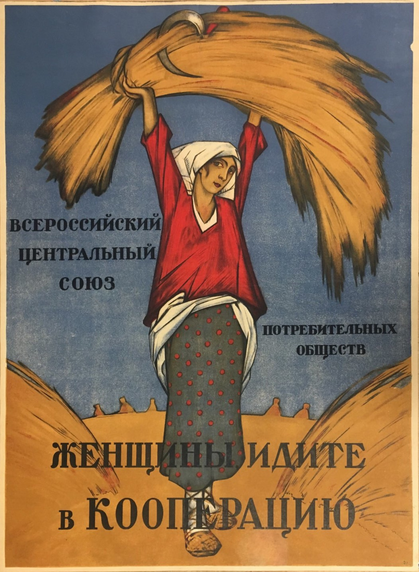 Women, Go into Cooperatives. (1918)/ Женщины, идите в кооперацию./Femmes, allez à la ooopérative.